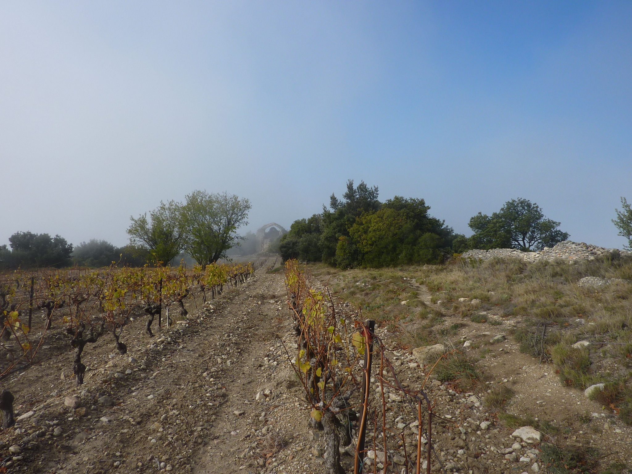 Vignes sur l'oppidum de Courens